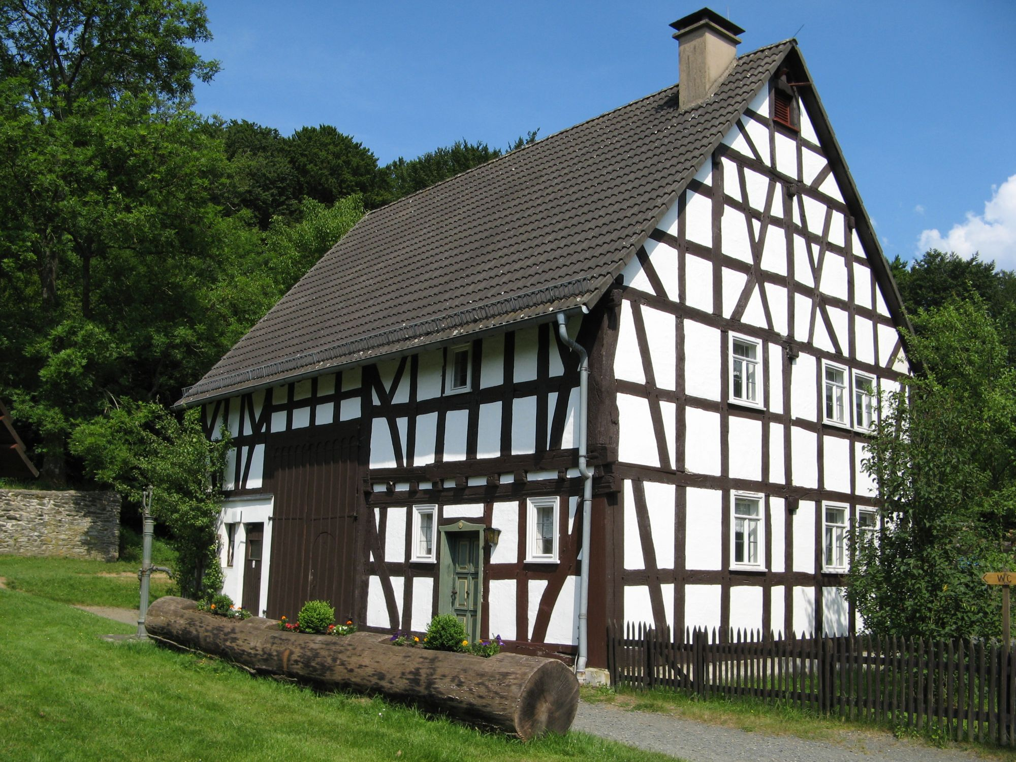 Das Dillhäuser Bauernhaus im Tiergarten Weilburg beherbergt heute ein Museum und einen Seminarraum